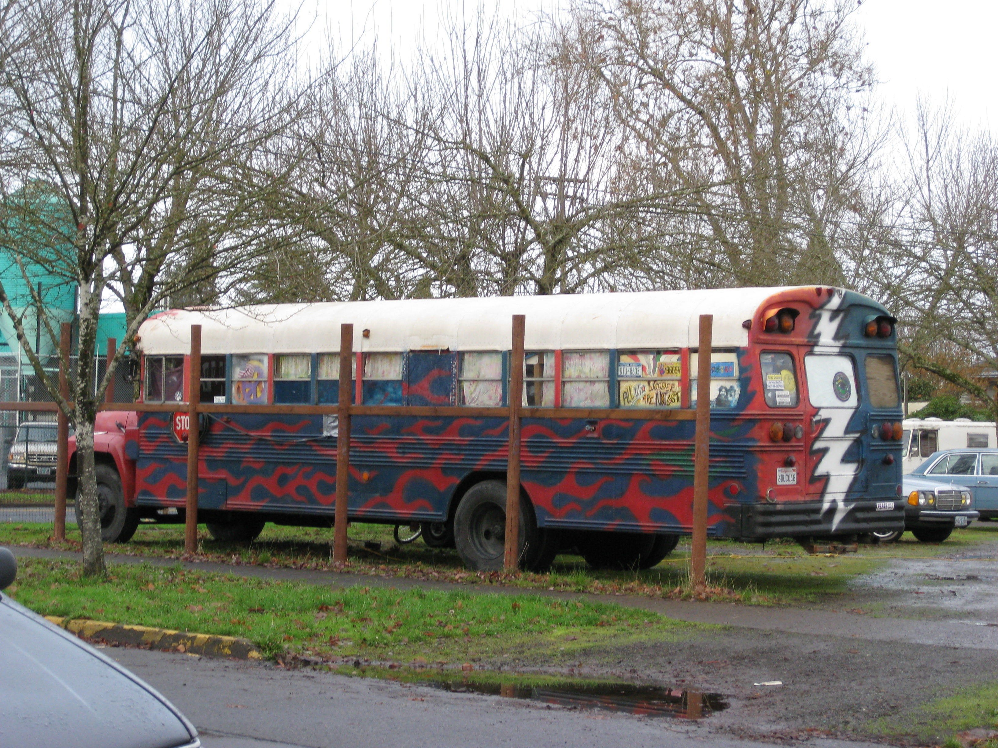 Deadhead bus